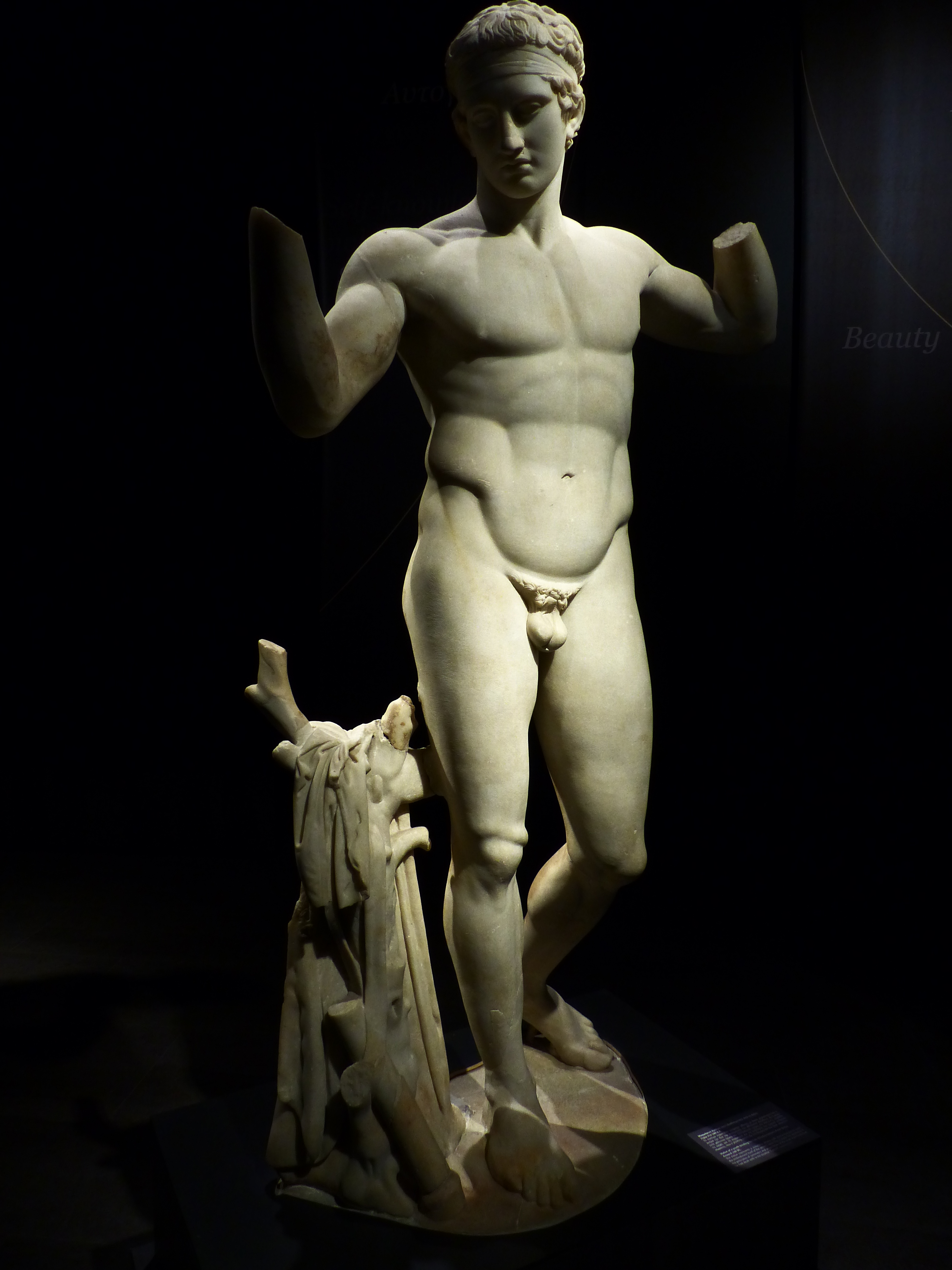 Diadúmeno, Atenas, Grecia, 2019